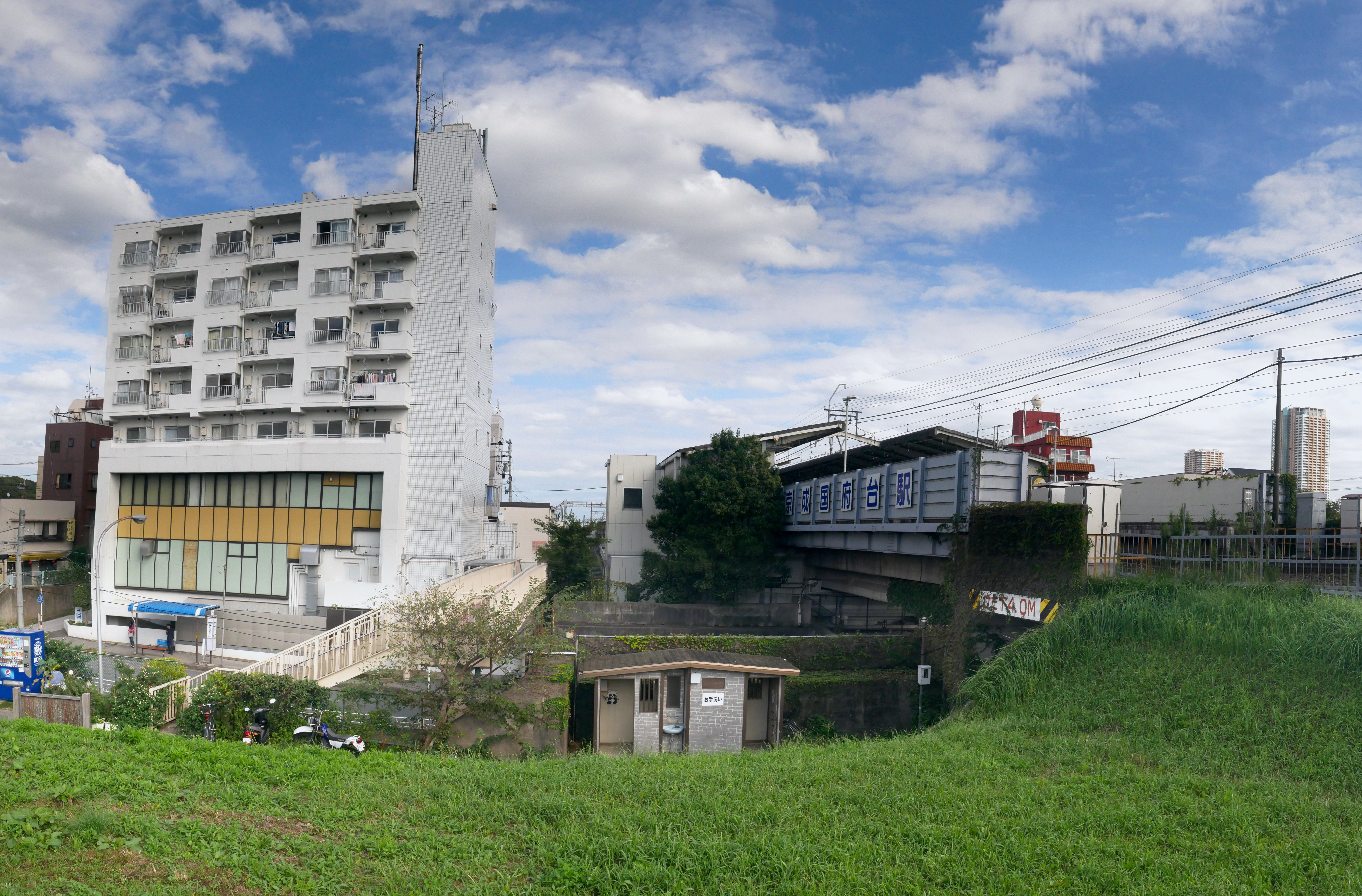 国府台駅 (Konodai Station)